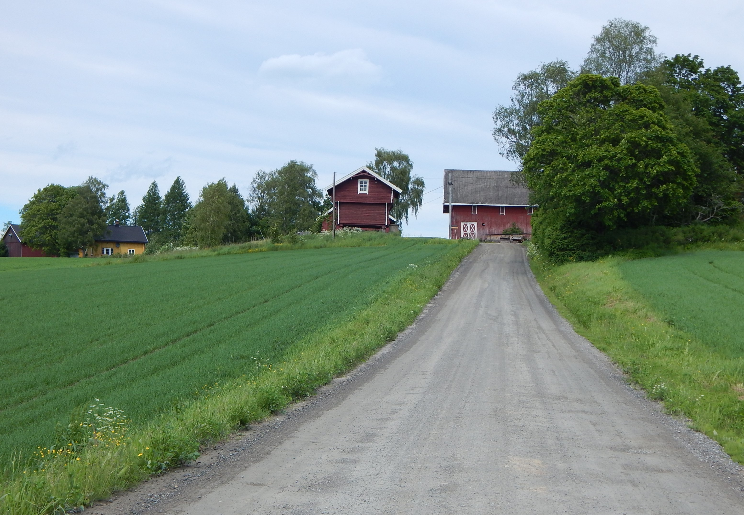 Aasgaardvegen ved Åsgård